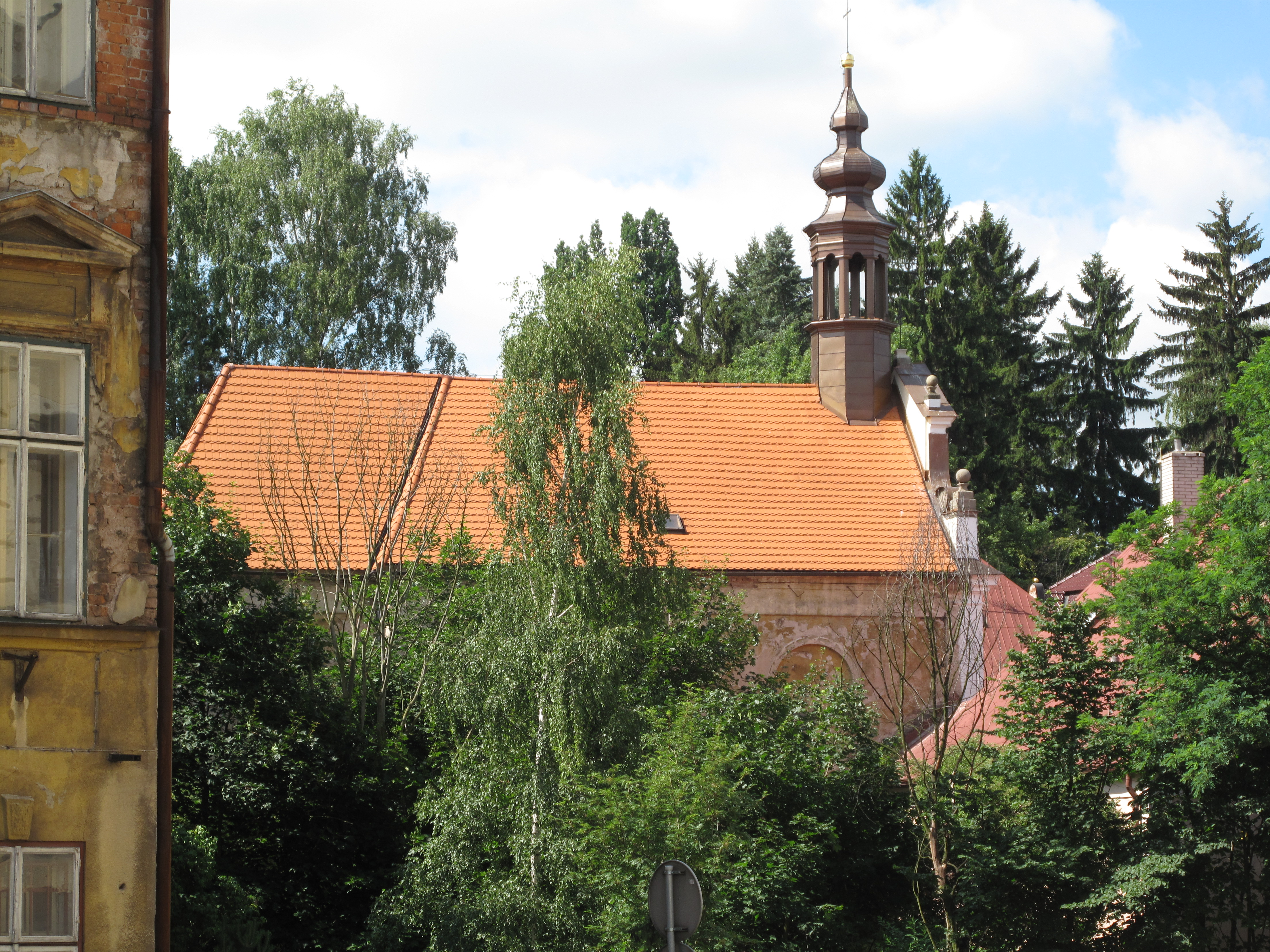 Česky: Broumov, kostel